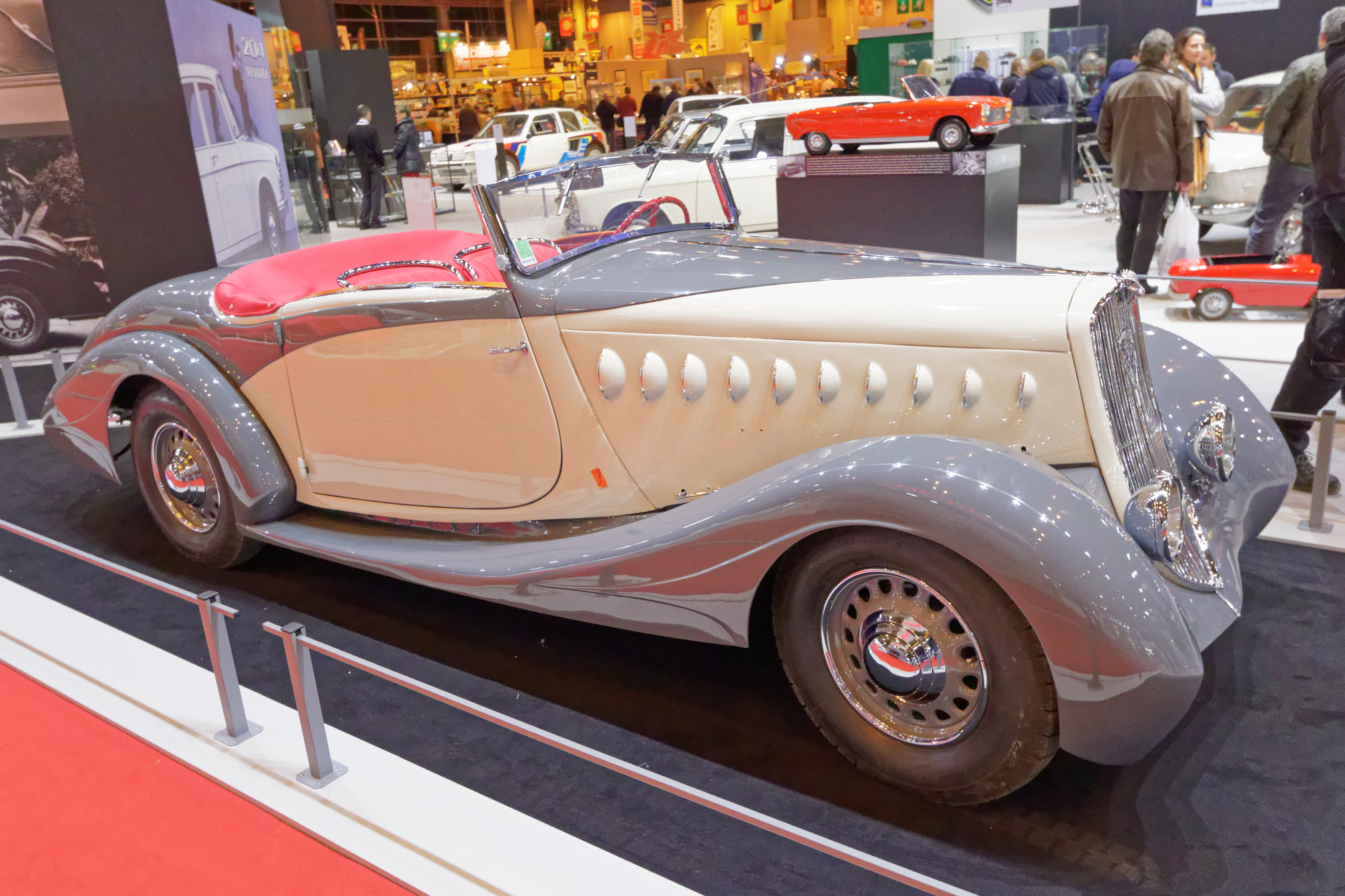 Une des voiture présentée lors du salon Rétromobile de Paris 2015